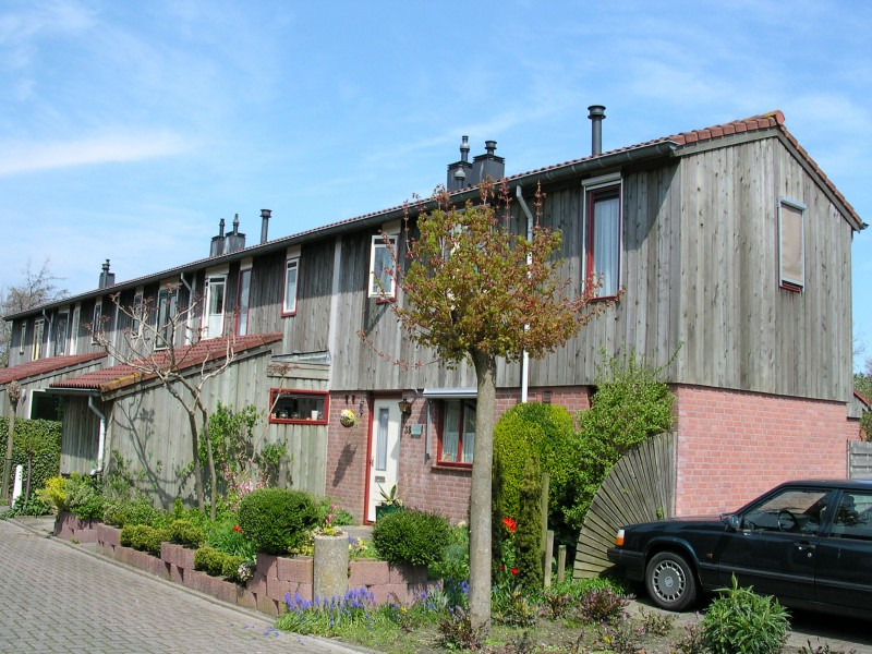 Bewoning, typerend voor de buurtschap Bangert in Andijk Typical houses of the hamlet Bangert in Andijk